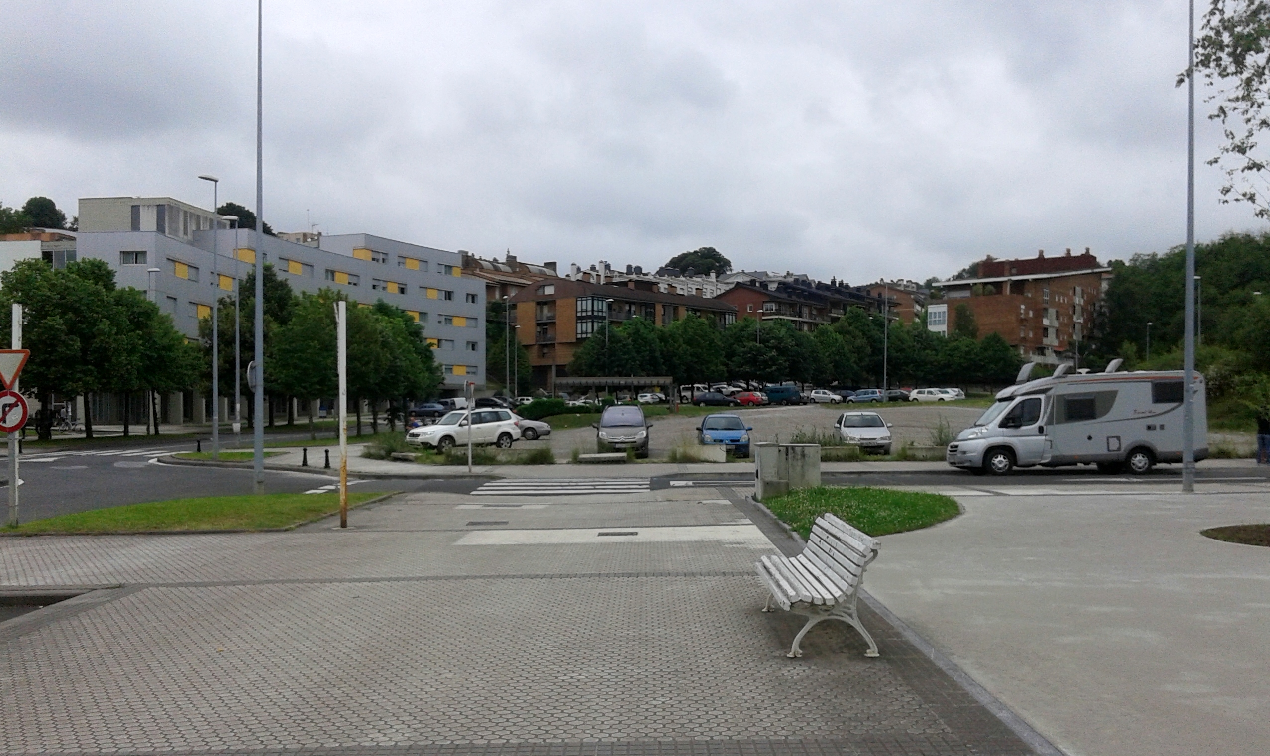 Berio auzoaren igoera.